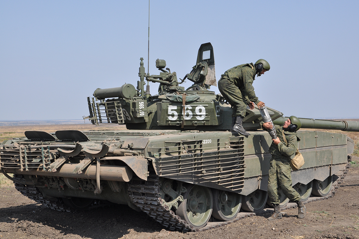 Танкисты мотострелкового соединения ЮВО уничтожили воздушные цели и бронетехнику условного противника в Ростовской области.